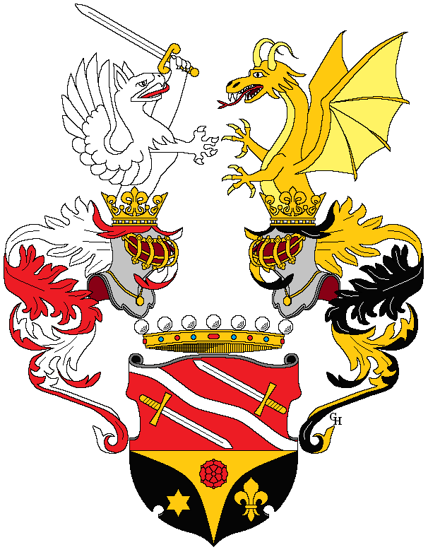 Wappen des k.u.k. Obersten Josef Lutschounig (1863–1923), verliehen anlässlich seiner Erhebung in den österreichischen Freiherrenstand mit dem Prädikat "von Felsenhof" als Ritter des Militär-Maria-Theresien-Ordens 1917. Zeichnung von Gerd Hruška ( Für weitere Informationen zu dieser Standeserhebung siehe (